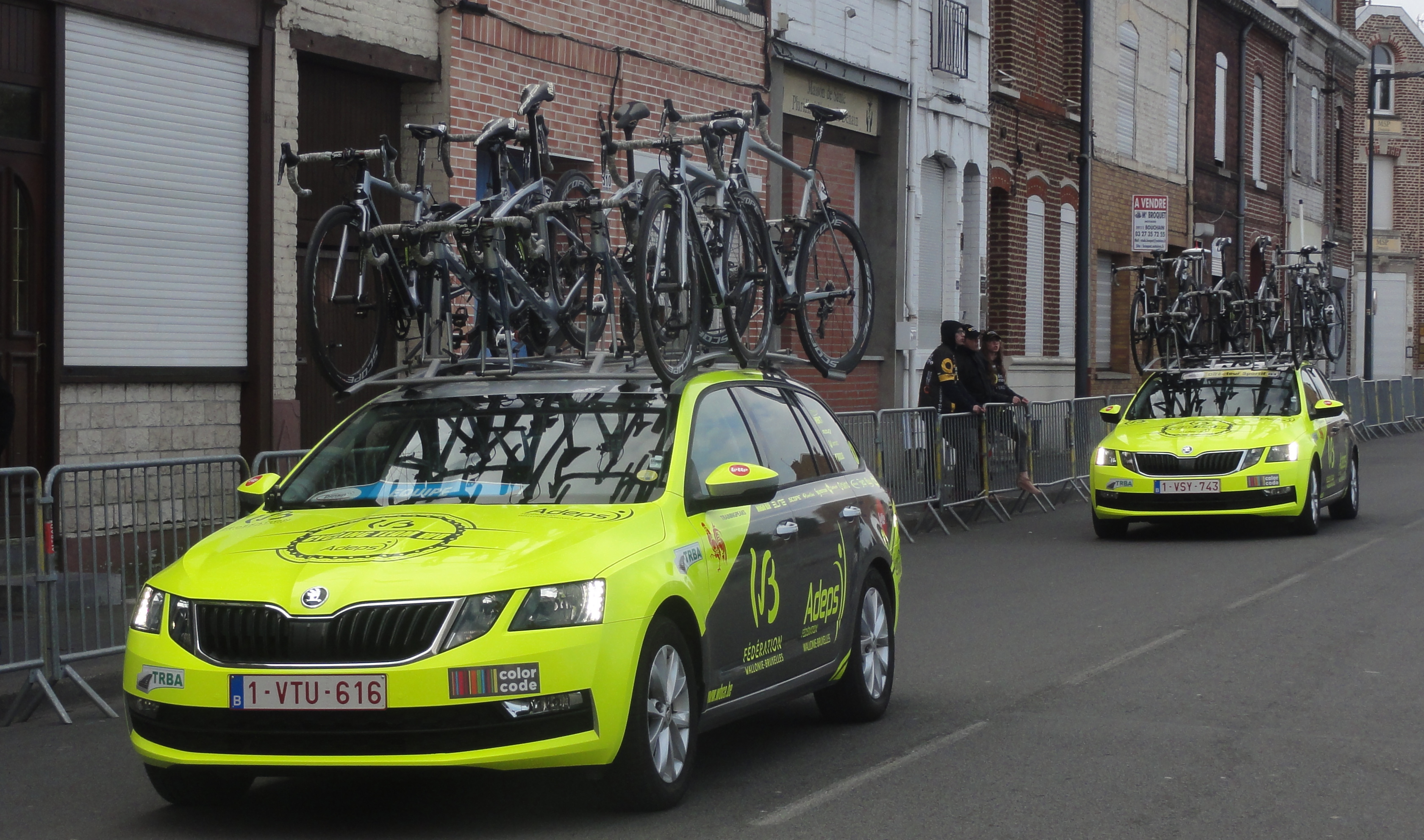 Reportage réalisé le dimanche 24 mars à l'occasion du départ et de l'arrivée du Grand Prix de Denain 2019 à Denain, Nord, Nord-Pas-de-Calais-Picardie, France.